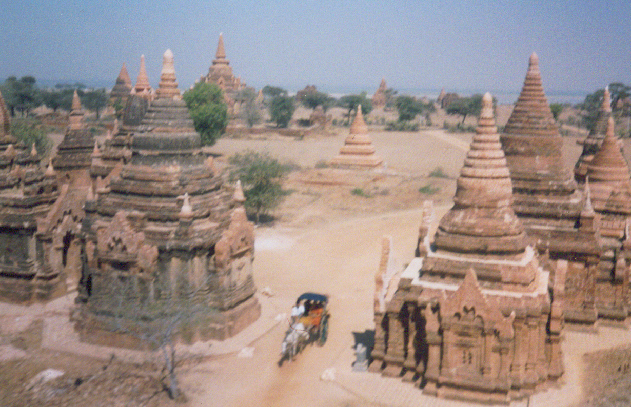 ПаганХрамы в Пагане